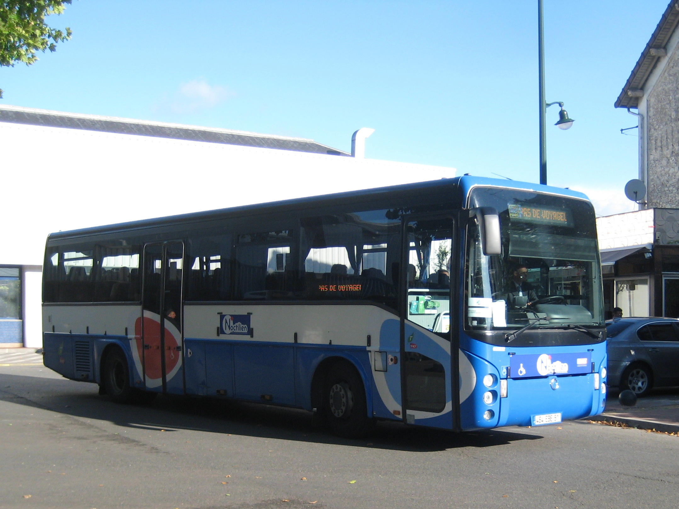 Car Noctilien (Transilien) assurant la liaison Corbeil-Essonnes - La Ferté-Alais en aout 2010. Corbeil-Essonnes. Essonne. France.